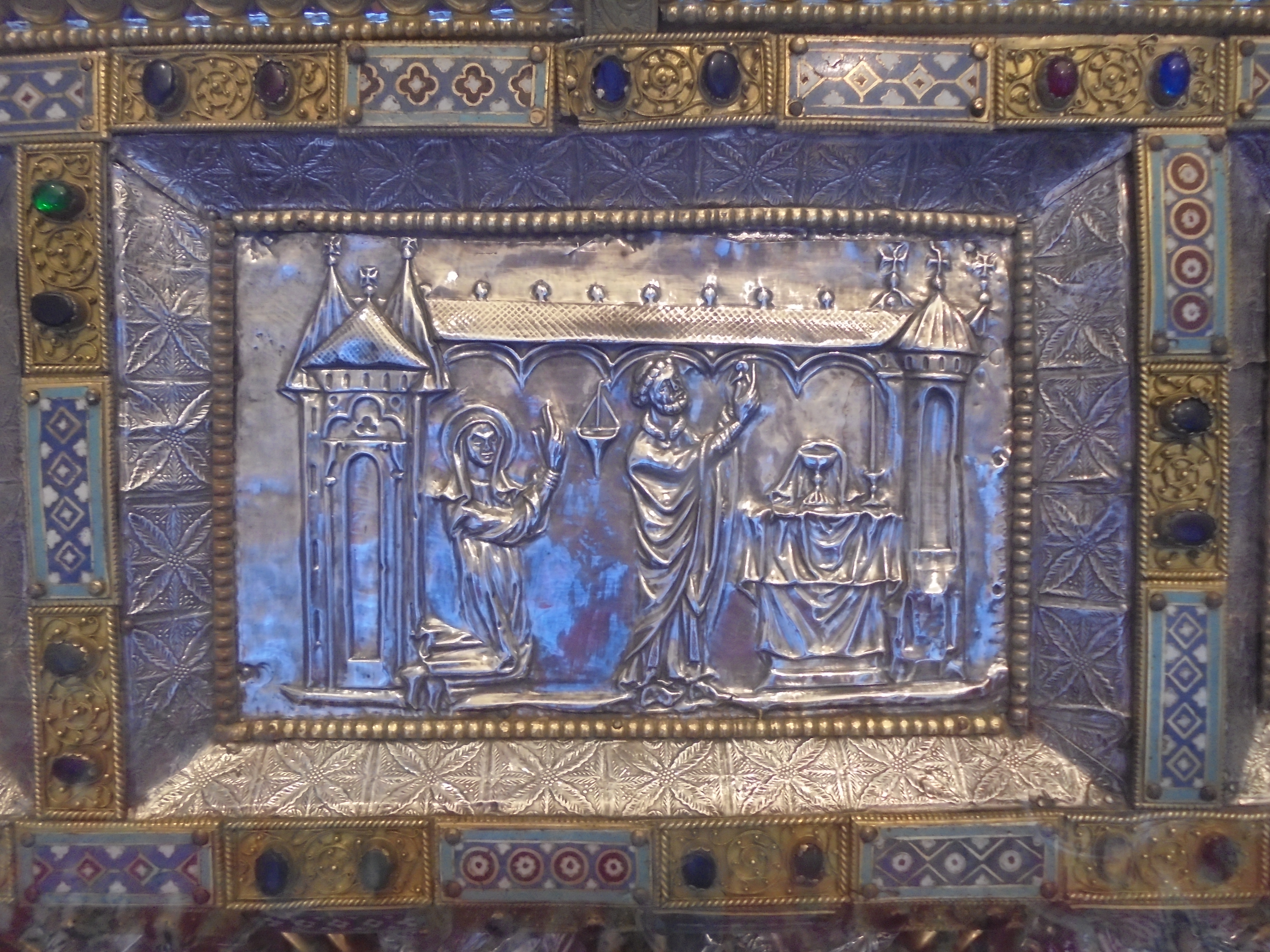 Deuxième scène de la bâtière de Sainte Ode de la châsse d'Amay, réalisé vers 1245-1255. Classé comme trésor de la Communauté Française depuis le 23 Novembre 2010.